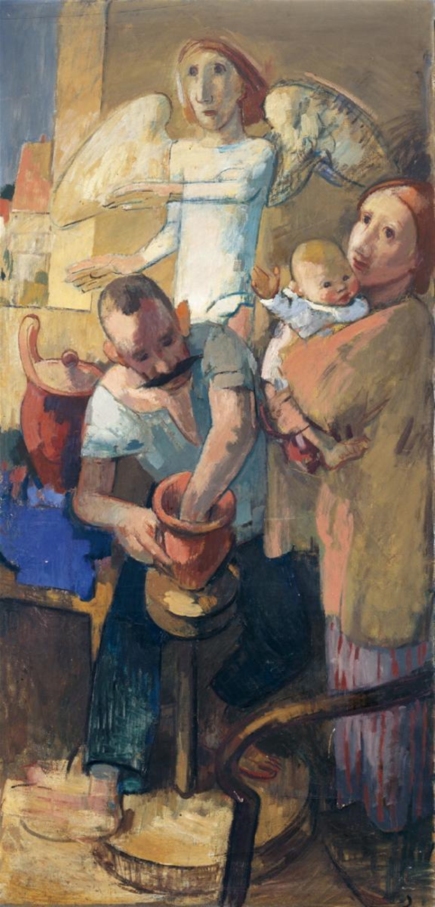 Johannes Driesch: Der Töpfer und sein Schutzengel. Sinnbildlich wird der deutsche Bauhaus-Tischler, Möbeldesigner und Hochschullehrer Erich Dieckmann (1896–1944) als Töpfer (Werkstoff- und Formengestalter) dargestellt, rechts seine Ehefrau Katharina, geborene Ludewig, mit Kleinkind. Auffällig sind der starke christliche Bezug des Bildes mit einem Schutzengel, der seine Hand über Dieckmanns Kopf hält und damit seine Schutzfunktion symbolisiert, und der Umstand, dass Dieckmanns kriegsversehrter linker Arm in einer sehr aktiven Funktion formend und gestaltend dargestellt wird. Sein linker Unterarm war durch Kriegsverwundung zerfetzt, wurde replantiert und mühnsam durch Implantationen wieder aufgebaut. Zwischen Schutzengel und bekannter körperlicher Einschränkung kann daher ein Zusammenhang angenommen werden. Das Gemälde wurde vom Künstler in Öl auf Leinwand kreiert und misst im Original gerahmt 195 x 95,7 cm. Im unteren Viertel des Gemäldes sind spätestens um das Jahr 2005 zwei Einrisse, die sachgerecht durch Fachpersonal restauriert worden sind. Das Gemälde befand sich im Besitz von Katharina Dieckmann, wurde um 1974 von der Berliner Galerie Nierendorf offeriert und ging in eine Privatsammlung nach Süddeutschland. Ausgestellt wurde es im Jahr 1930 vom Anger-Museum in Erfurt im Verlauf der Gedächtnisausstellung Johannes Driesch – Gemälde, Zeichnungen, Graphik. Seit dieser Zeit trgät das Gemälde auf seiner Rückseite die Katalognummer 19. In dem genannten Katalog wurde aus auf der Umschlagseite 4 in Farbe abgedruckt. Angaben zum Bild gem. Galerie Lempertz, Köln. Auktion 882, Moderne Kunst vom 3. Dezember 2005. Damaliger Schätzpreis: 8000–10000 Euro, Auktionsergebnis: 9.520 Euro.